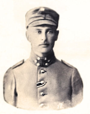 Einari Waltter Weijo